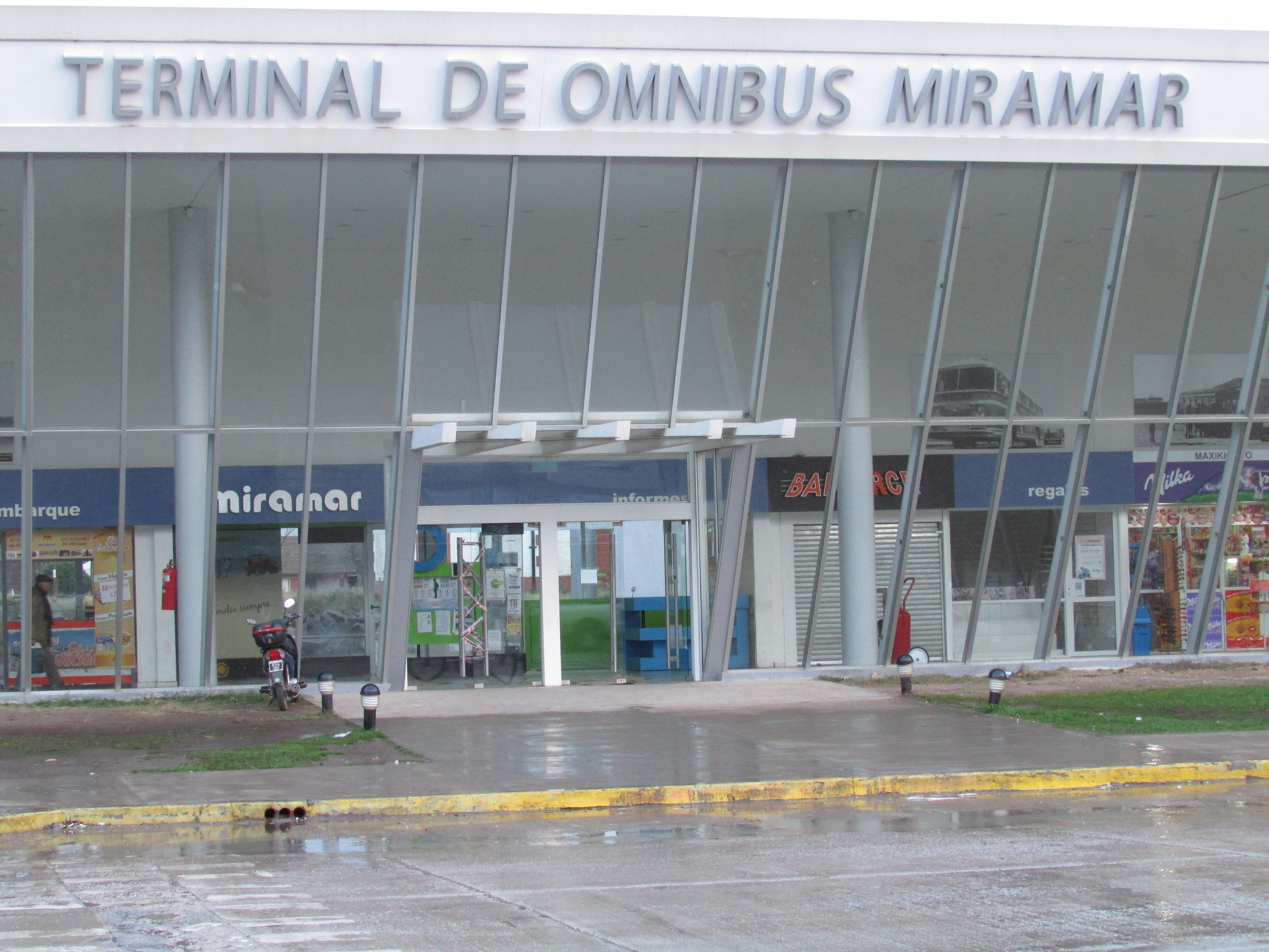 Frente de la terminal de ómnibus de Miramar, provincia de Buenos Aires, Argentina.